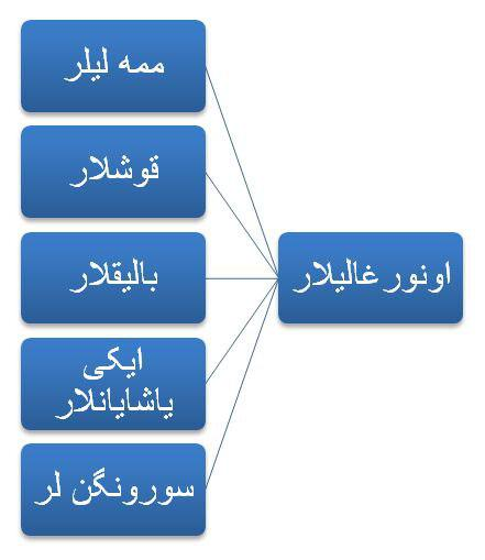 تۆرکجه: انورقالی لار - مهره لی لر